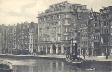 Bonneterie, Rokin 150, Amsterdam